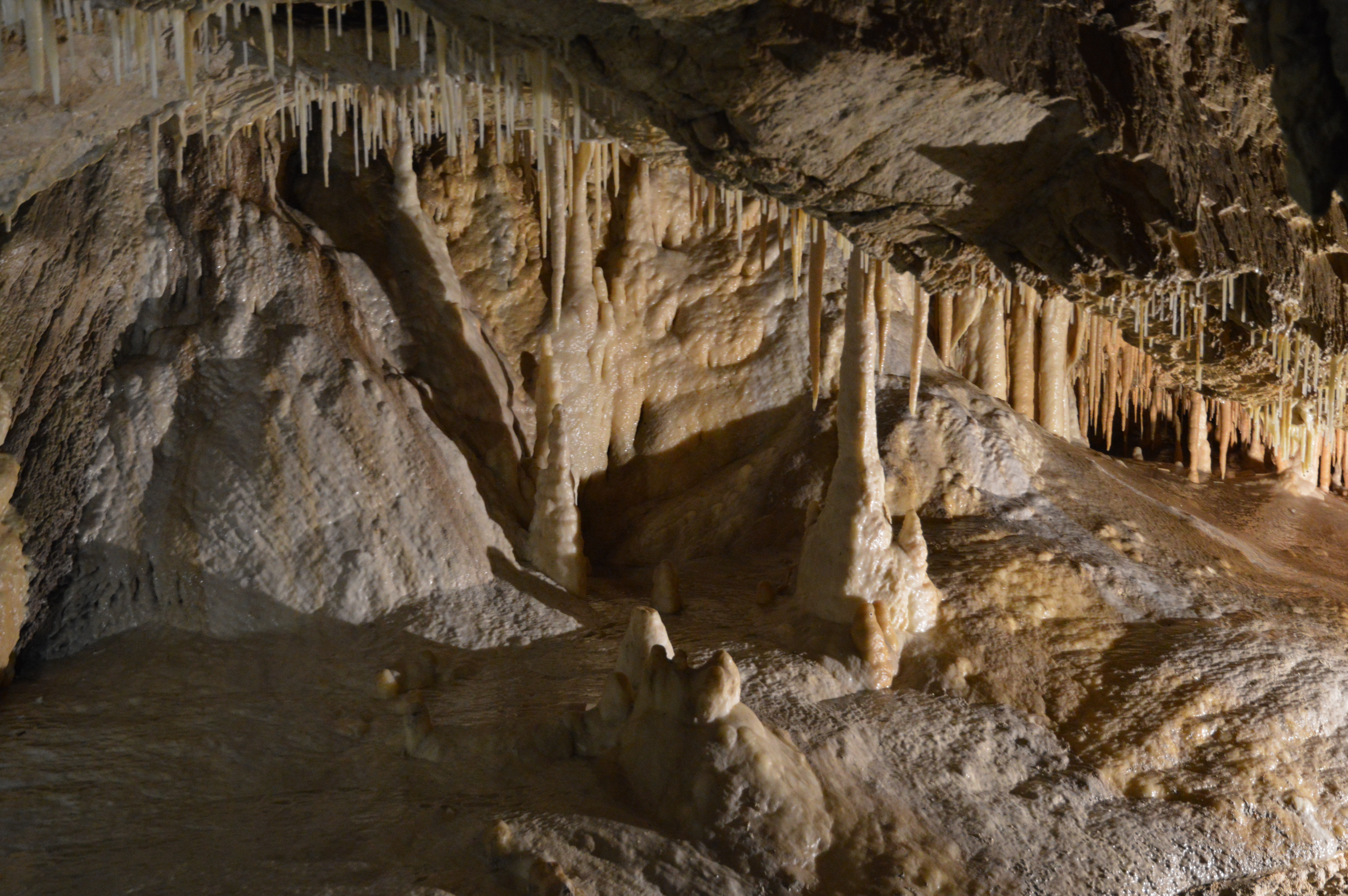 Jaskinia Niedźwiedzia w Kletnie, szata naciekowa